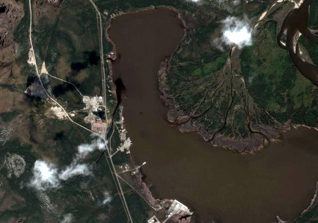 Otter Creek Water Aerodrome